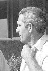 יעקב אלבז